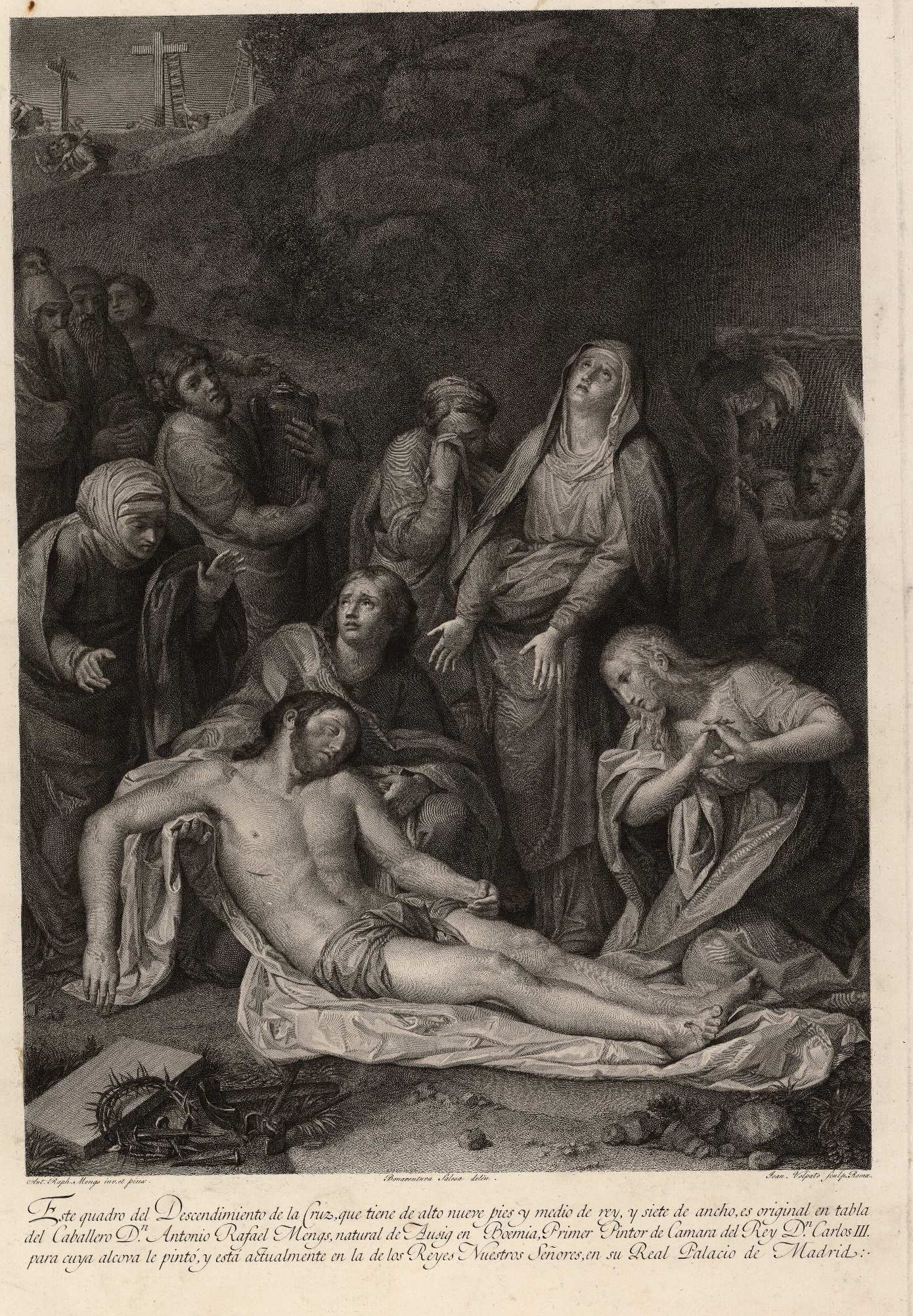 Descendimiento de la Cruz, grabado calcográfico. Madrid, Biblioteca Nacional deEspaña